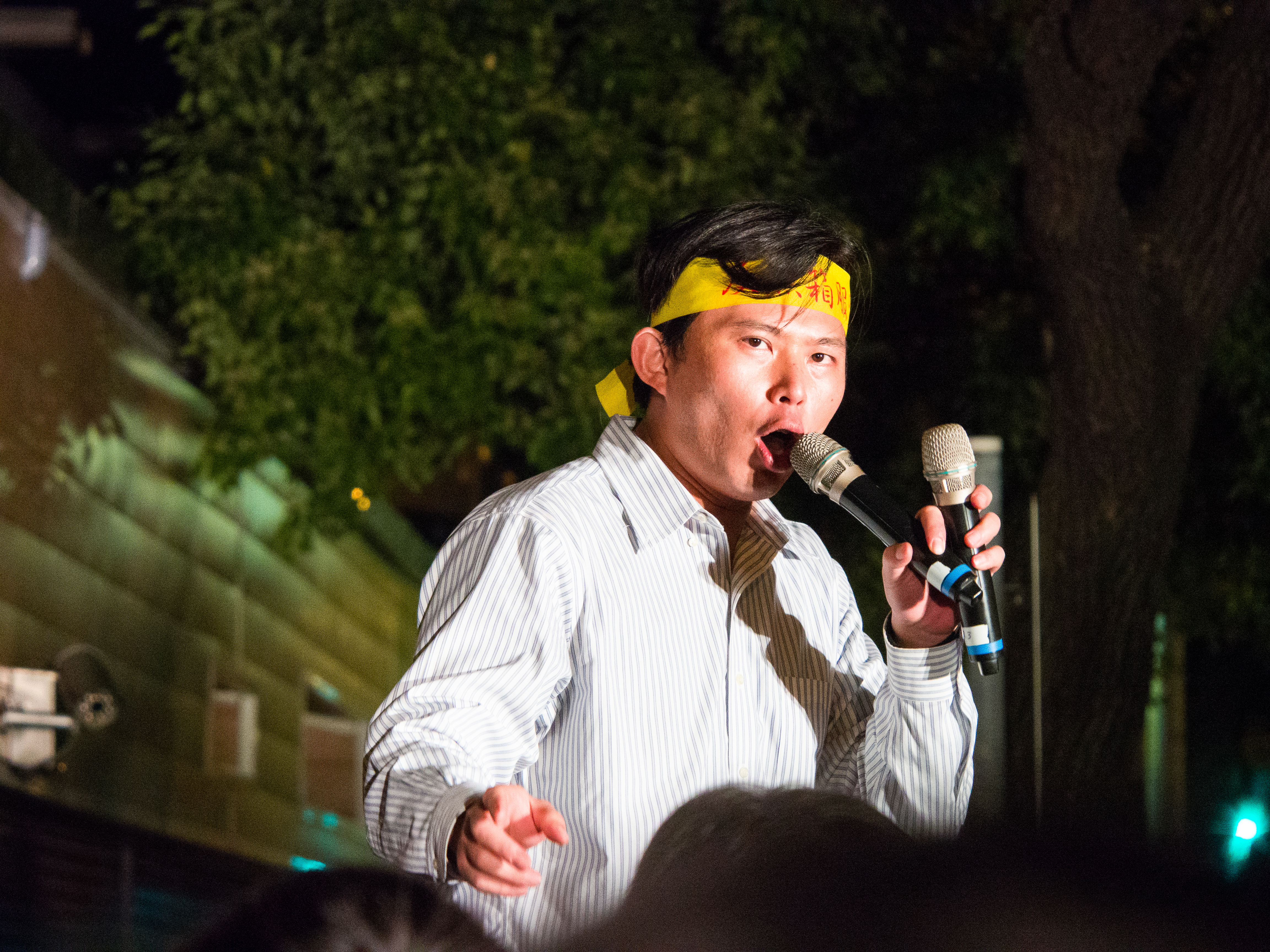 2014-03-18 反黑箱服貿